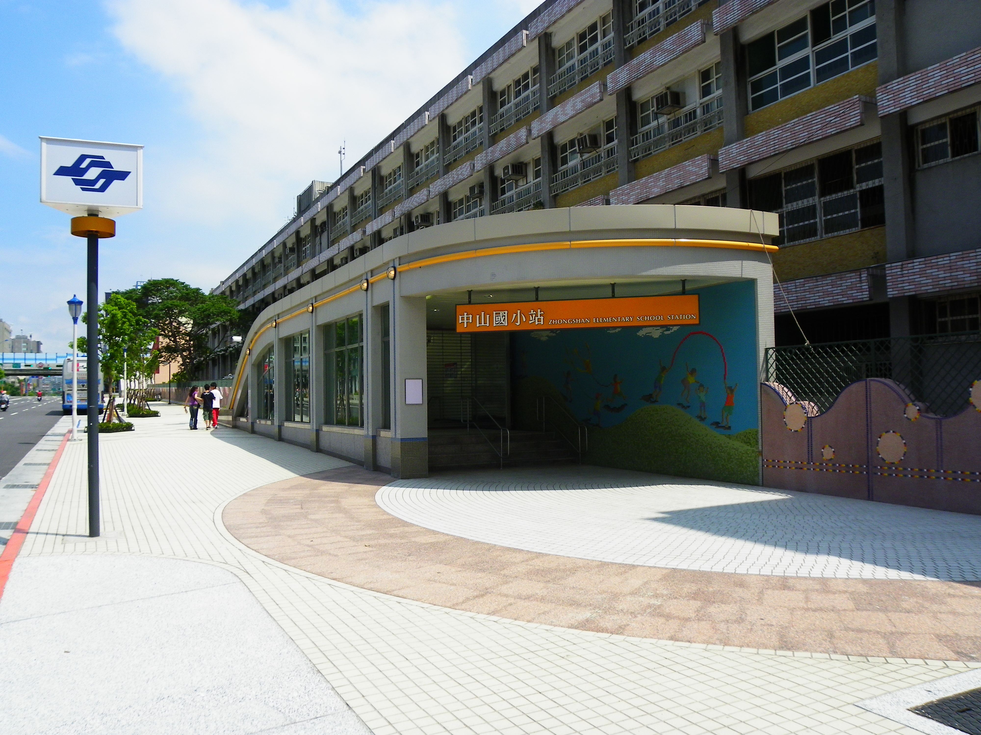 未通車啟用前的臺北捷運新莊線中山國小站2號出口，後方是新興國中。